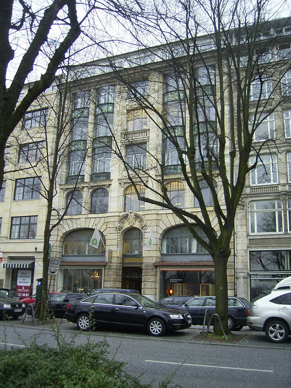 Das Alsterhaus am Ballindamm 13 in Hamburg-Altstadt, nicht zu verwechseln mit dem gleichnamigen Kaufhaus am Jungfernstieg, wurde 1902/03 von Rambatz & Jollasse für den Kaufmann Max Albrecht erbaut. Auffällig sind die Bronzefensterrahmen im Jugendstil. This is a photograph of an architectural monument.